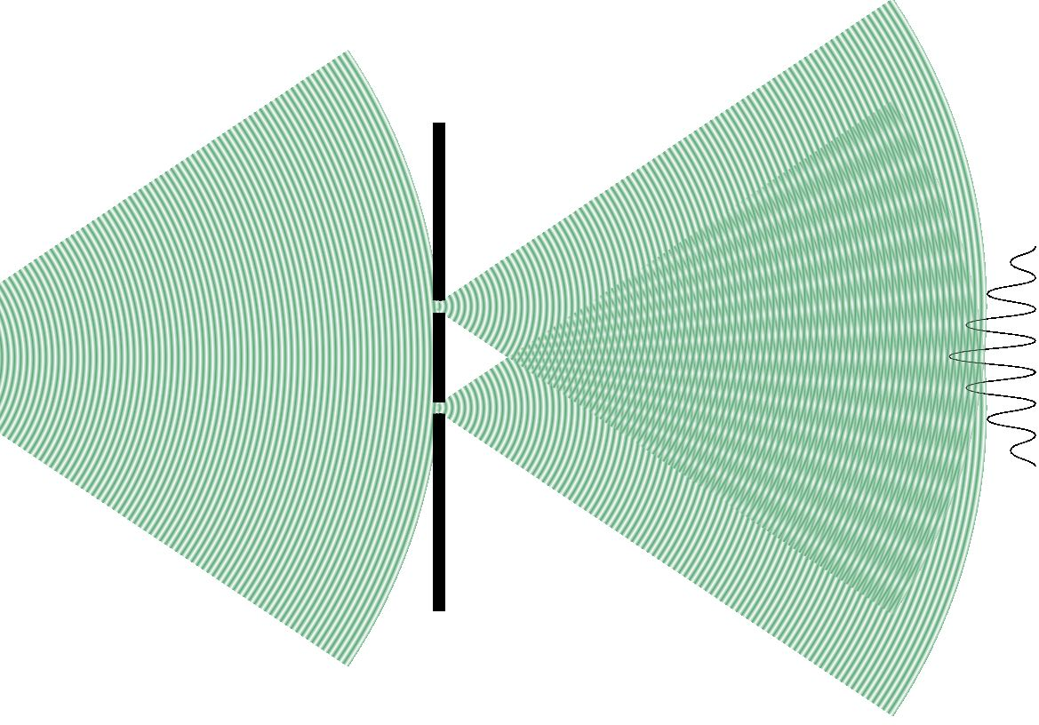 Illustration de l'expérience des fentes d'Young. voir le fichier SVG de meme nom.